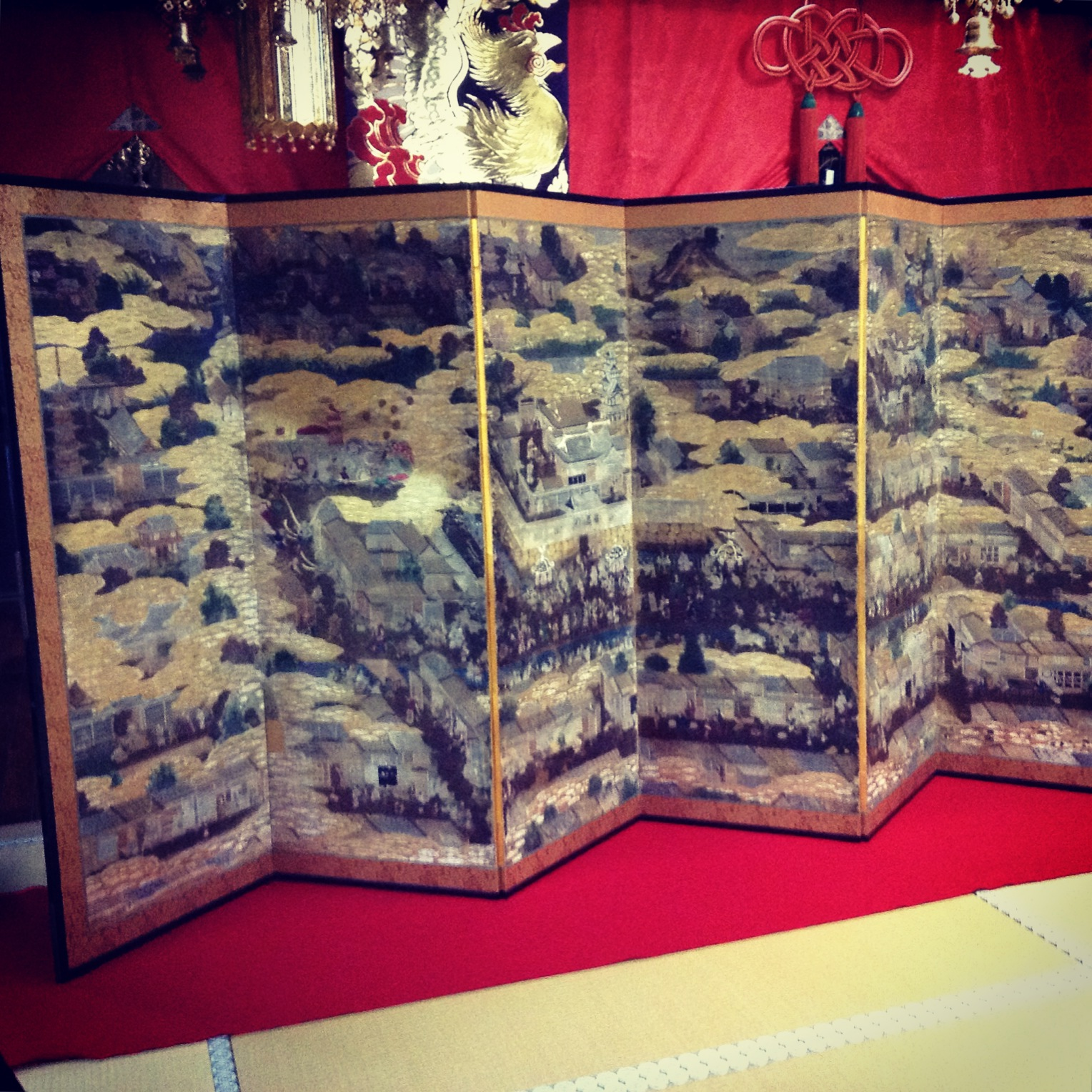 PictureEnmeiji